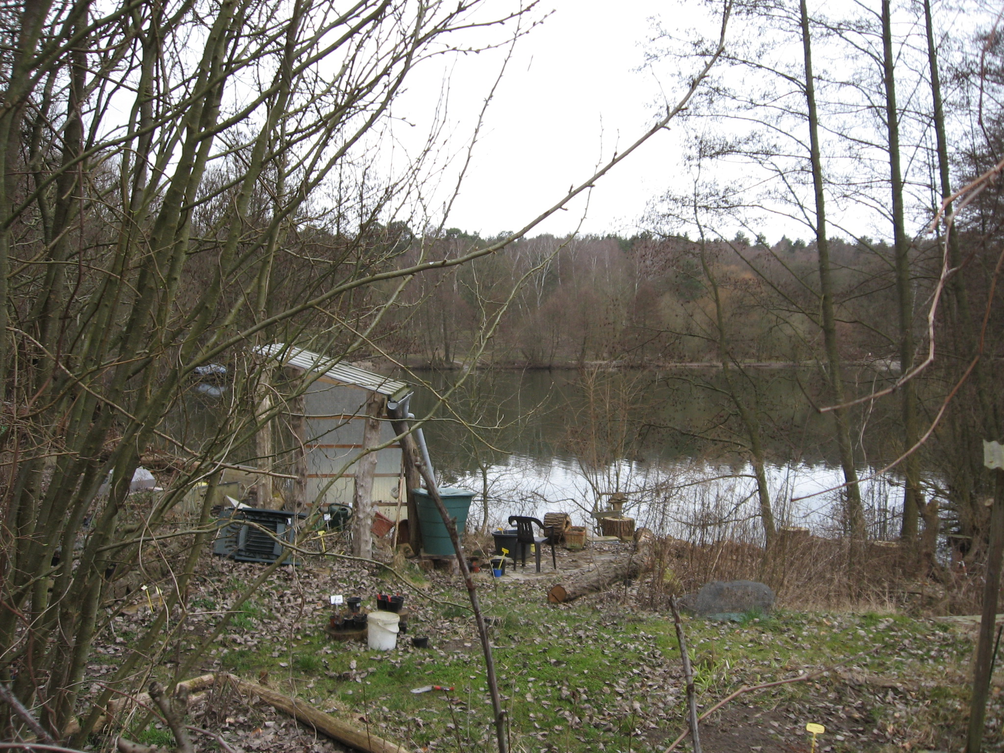 Südrand des Ökowerk Teufelssee mit Teufelssee.